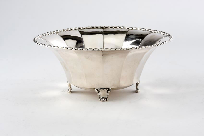 evald nielsen design